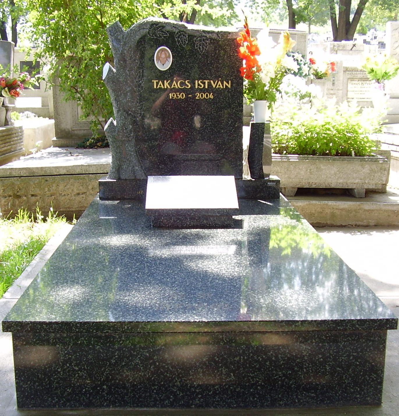 Takács István (1930. október 10. – 2004. január 27.) tanácselnök síremléke Kazincbarcikán